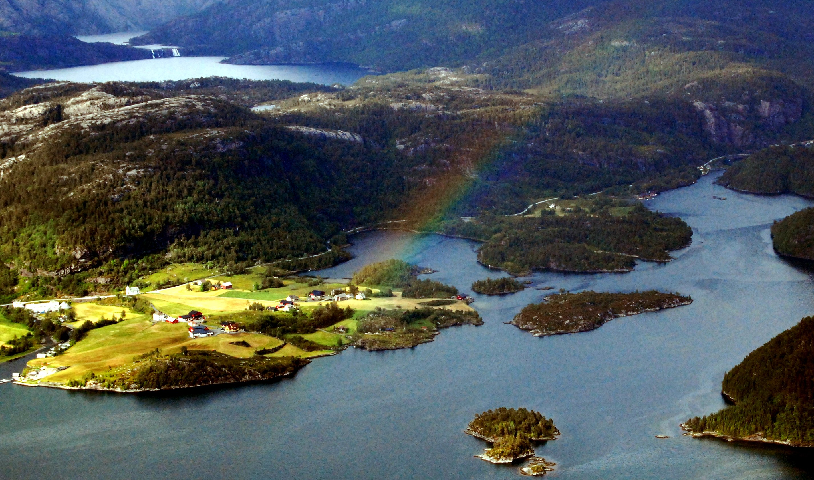 Norddalsfjorden